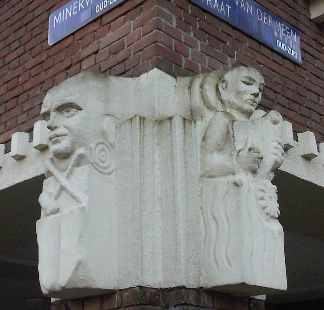 Reliëf Minervalaan, Amsterdam (hoek Gerrit van der Veenstraat). Links afgebeeld: E.J. Abrahams (wethouder publieke werken van de gemeente Amsterdam); rechts een harpspeler.